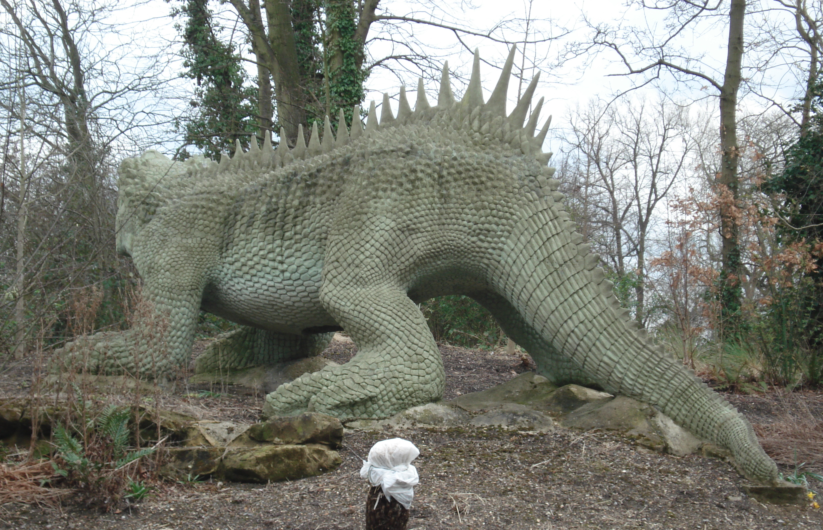 Crystal Palace 'Dinosaurs'